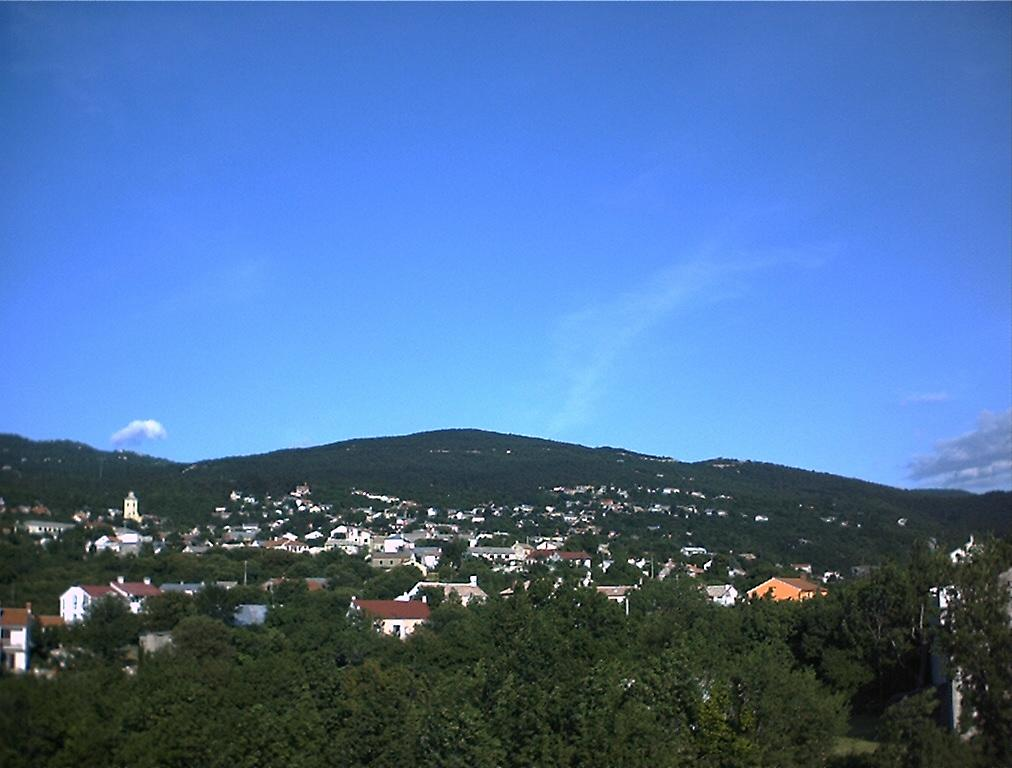 Hreljin Panorama snimljeno s starog igrališta (Biljin)